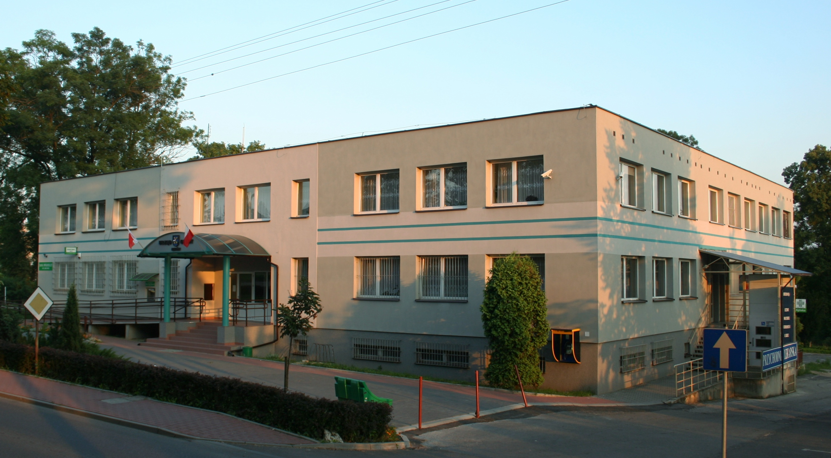 przychodnia lekarska w Mstowie , woj. śląskie